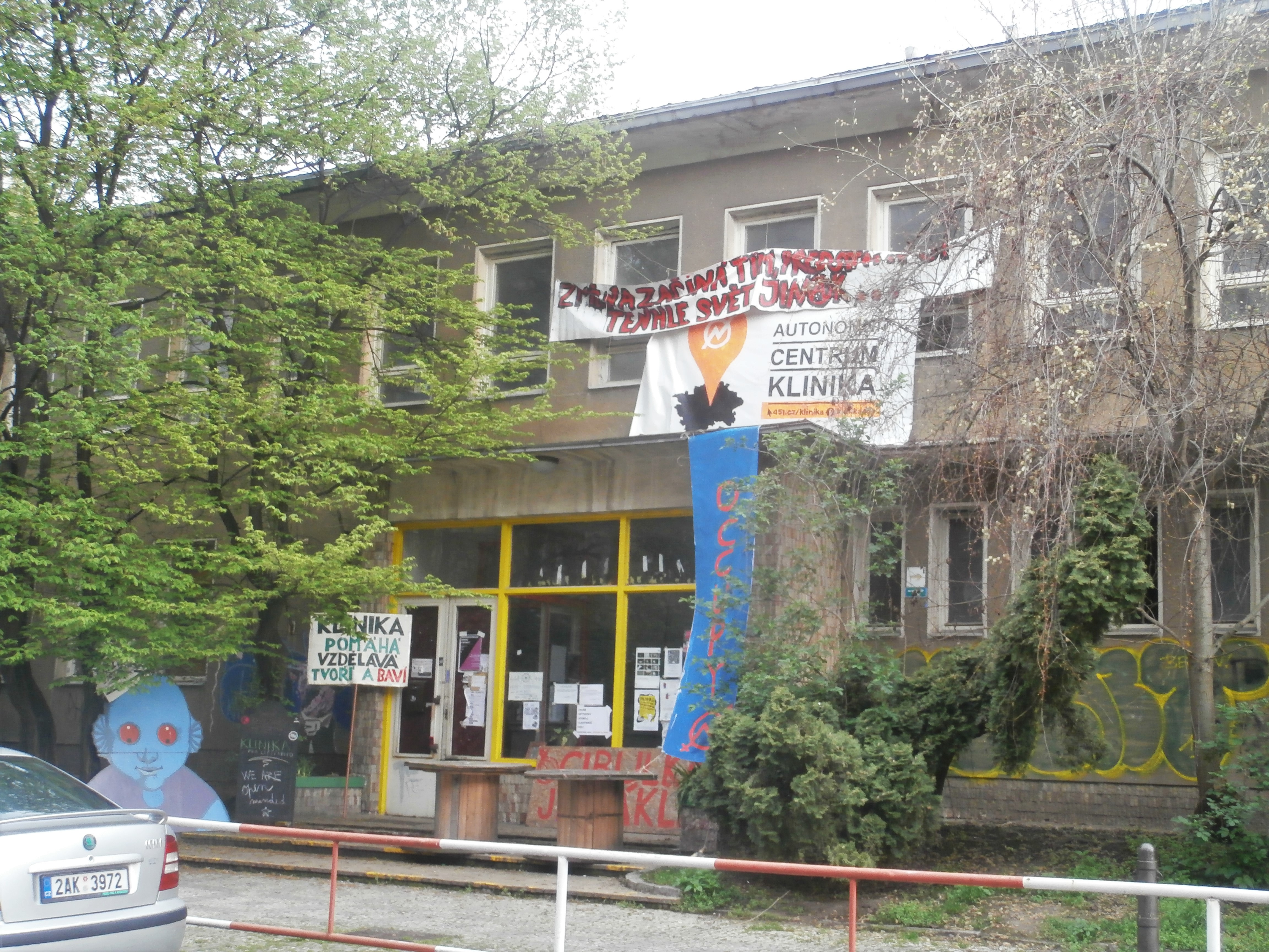 Centrum Klinika, hlavní vchod z Jeseniovy ulice